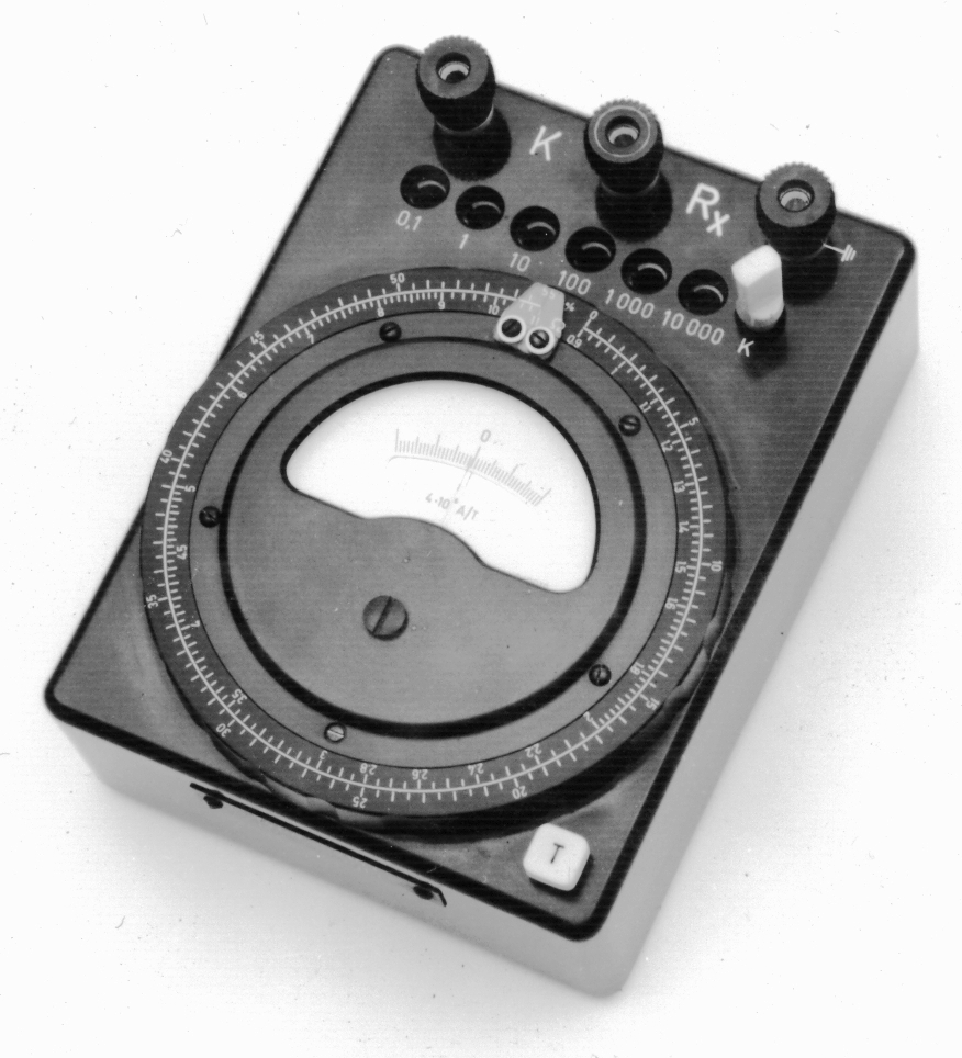 Földelődés mérő műszer